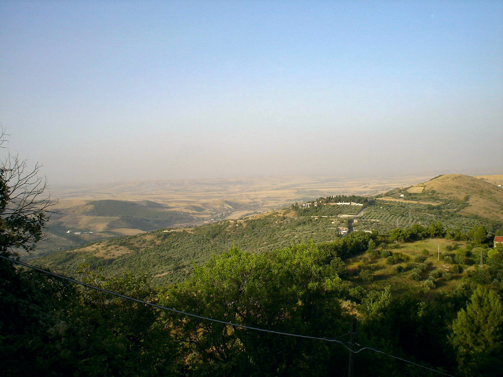 Il Tavoliere delle Puglie visto da Bovino.